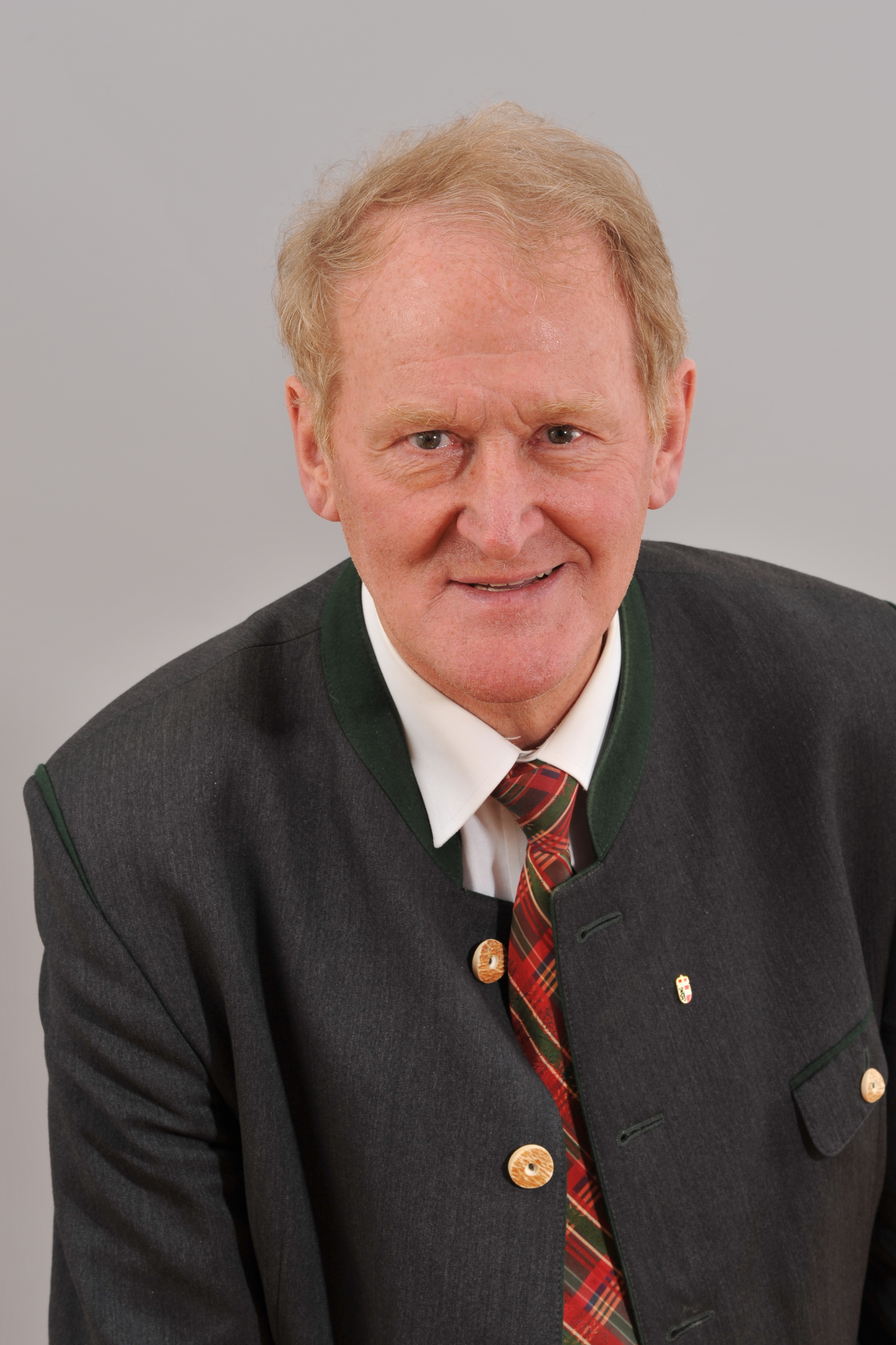 Landtagsprojekt Salzburg: Ernst Rothenwänder